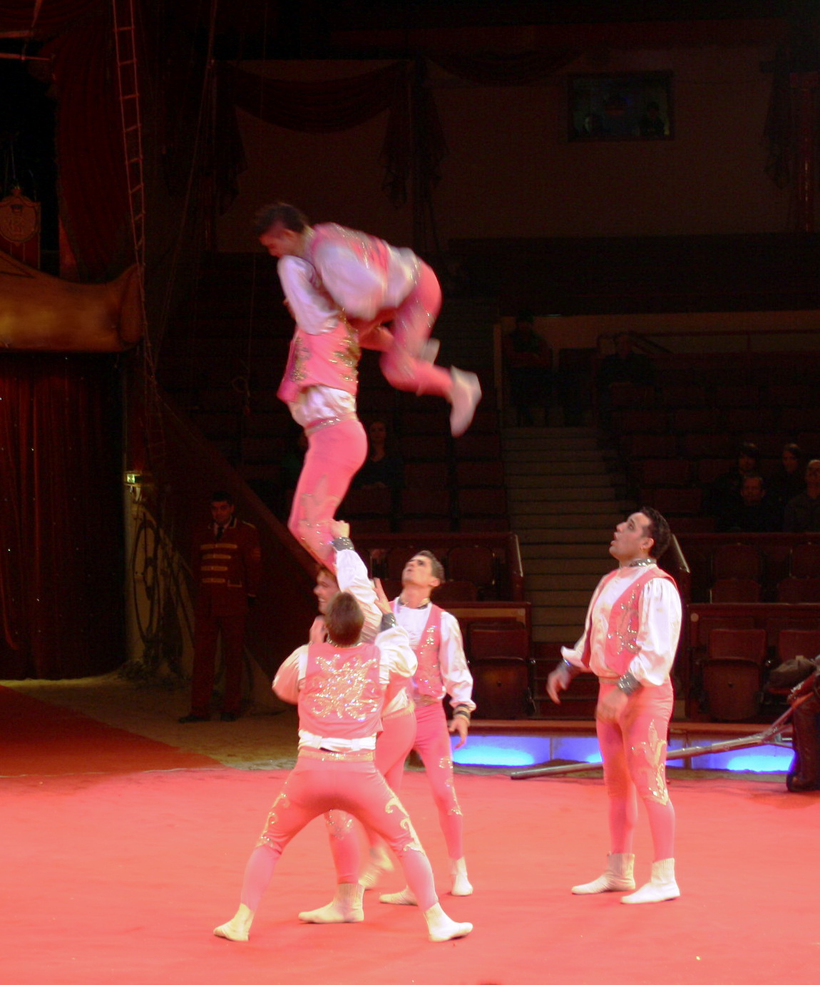 Truppe Scala aus Cuba unterwegs mit dem Schleuderbrett. Landung verpatzt.